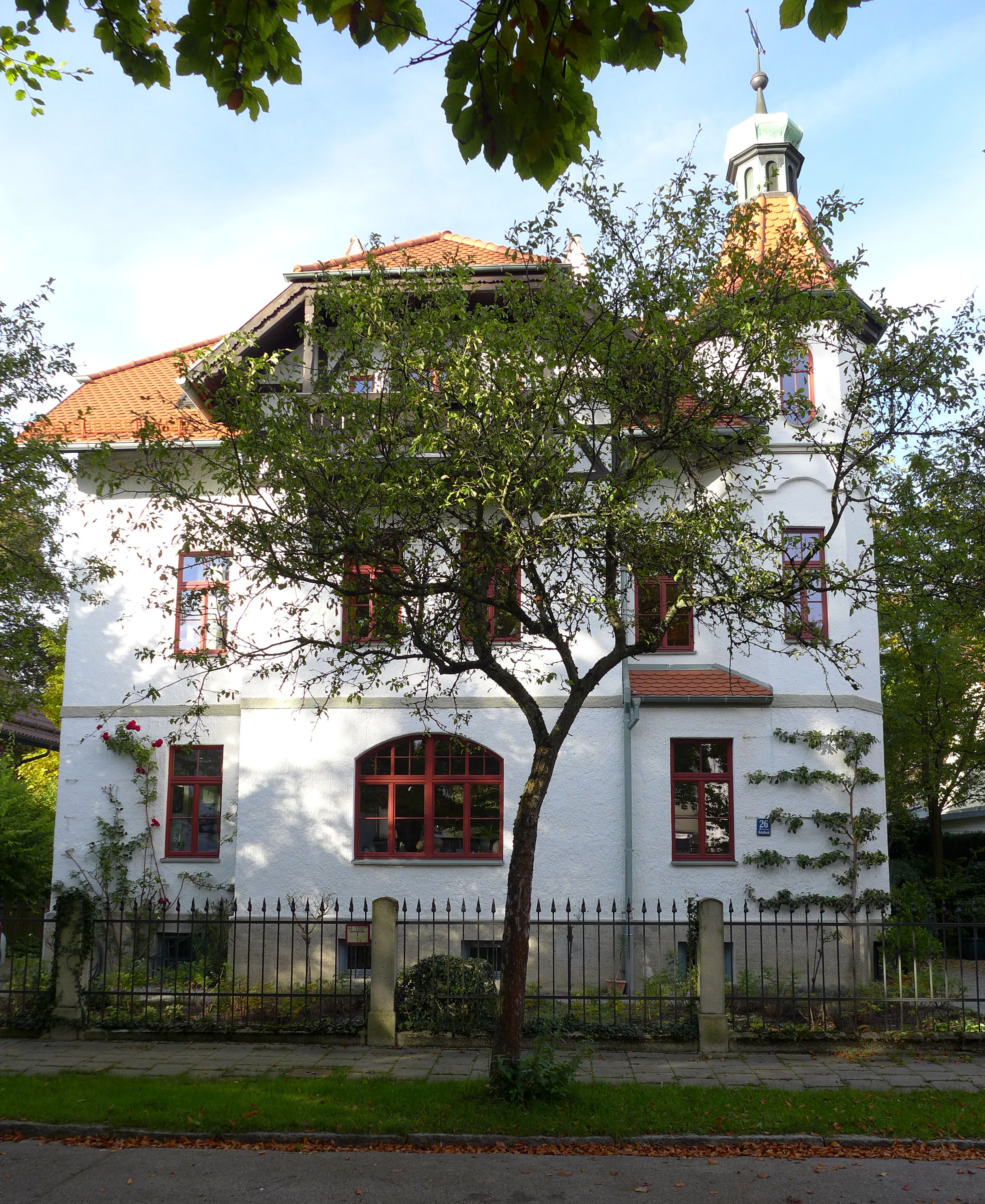 Hofmillerstr 26, München